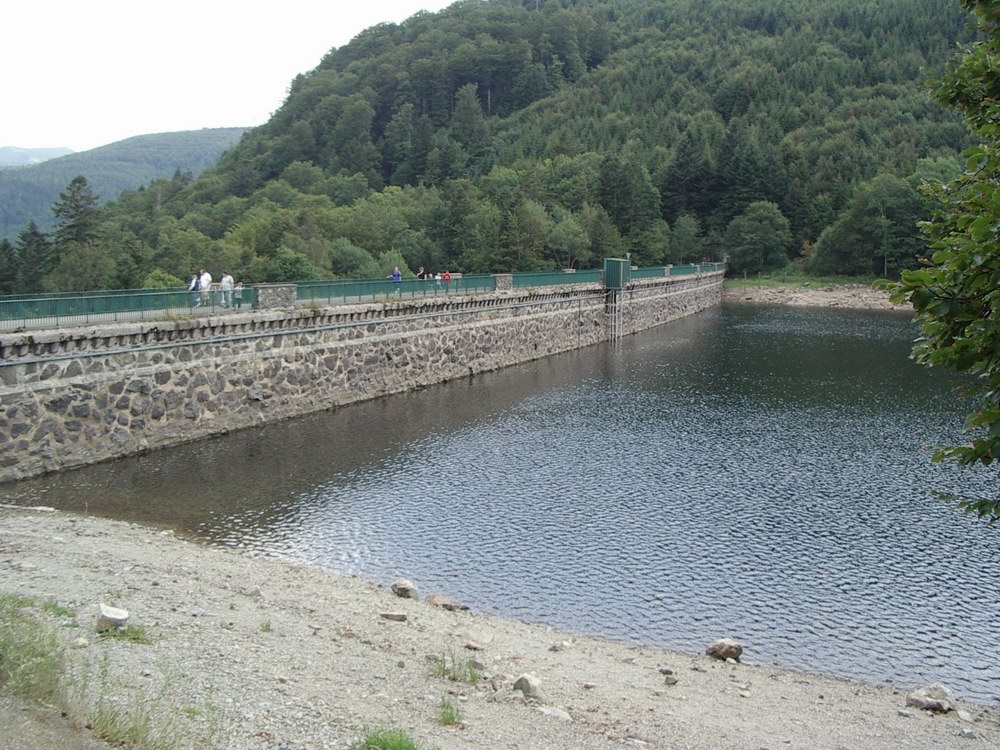 Lac de la Lauch (le barrage), Haut-Rhin (France).